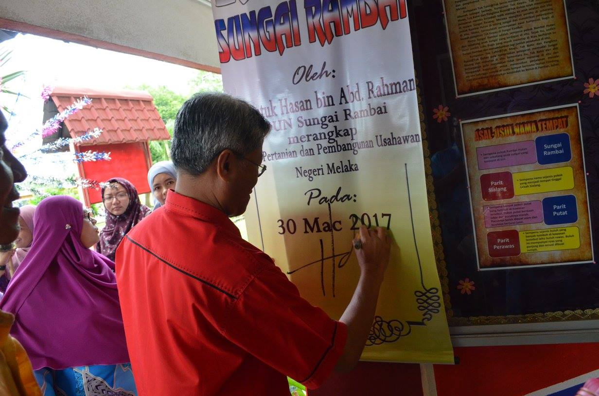 yb hasan rasmi